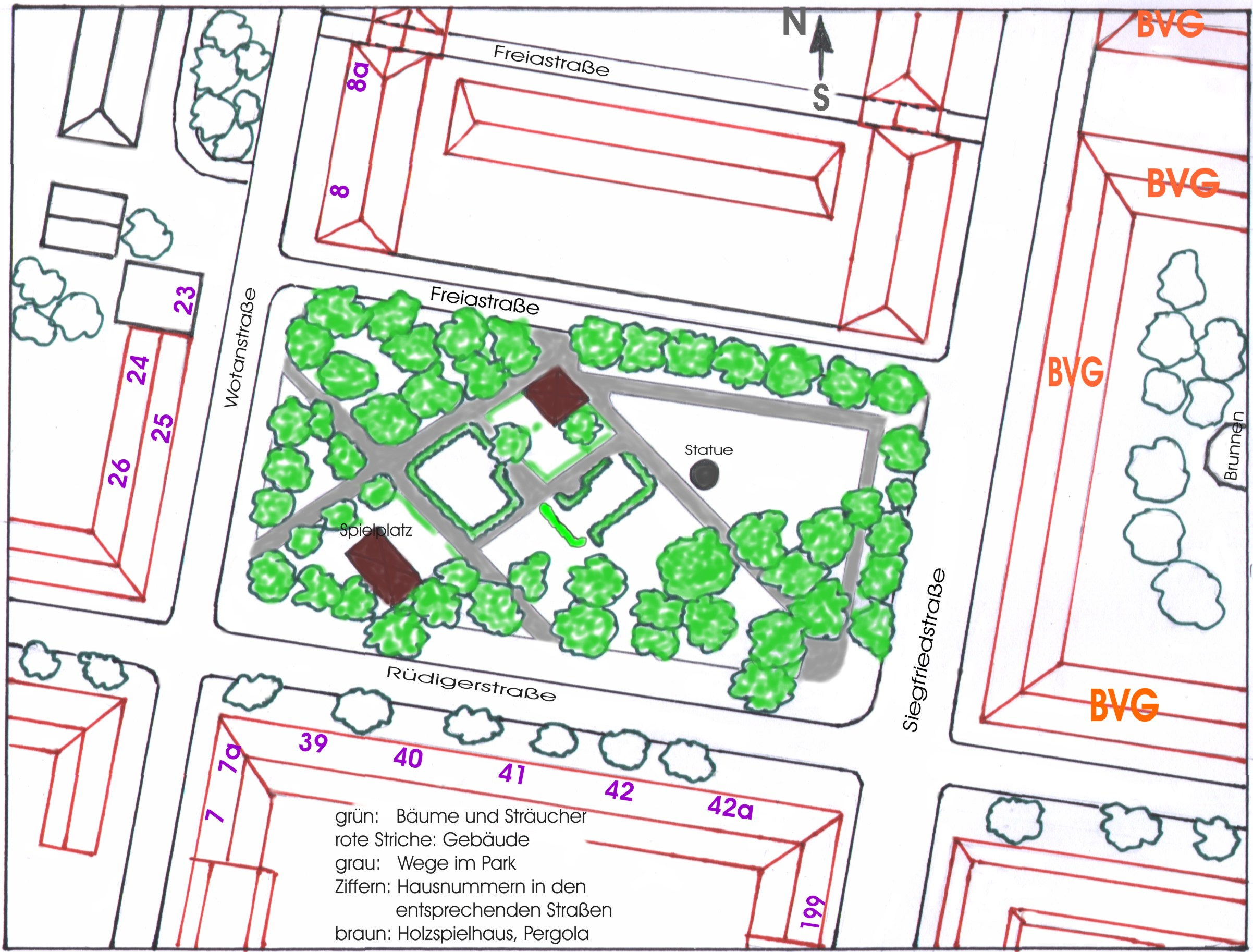 Freiaplatz in Berlin-Lichtenberg, Zeichnung zur Lage